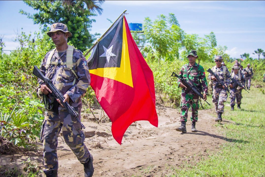 Osttimoresische Grenzpolizei (Unidade da Polícia de Fronteiras UPF)